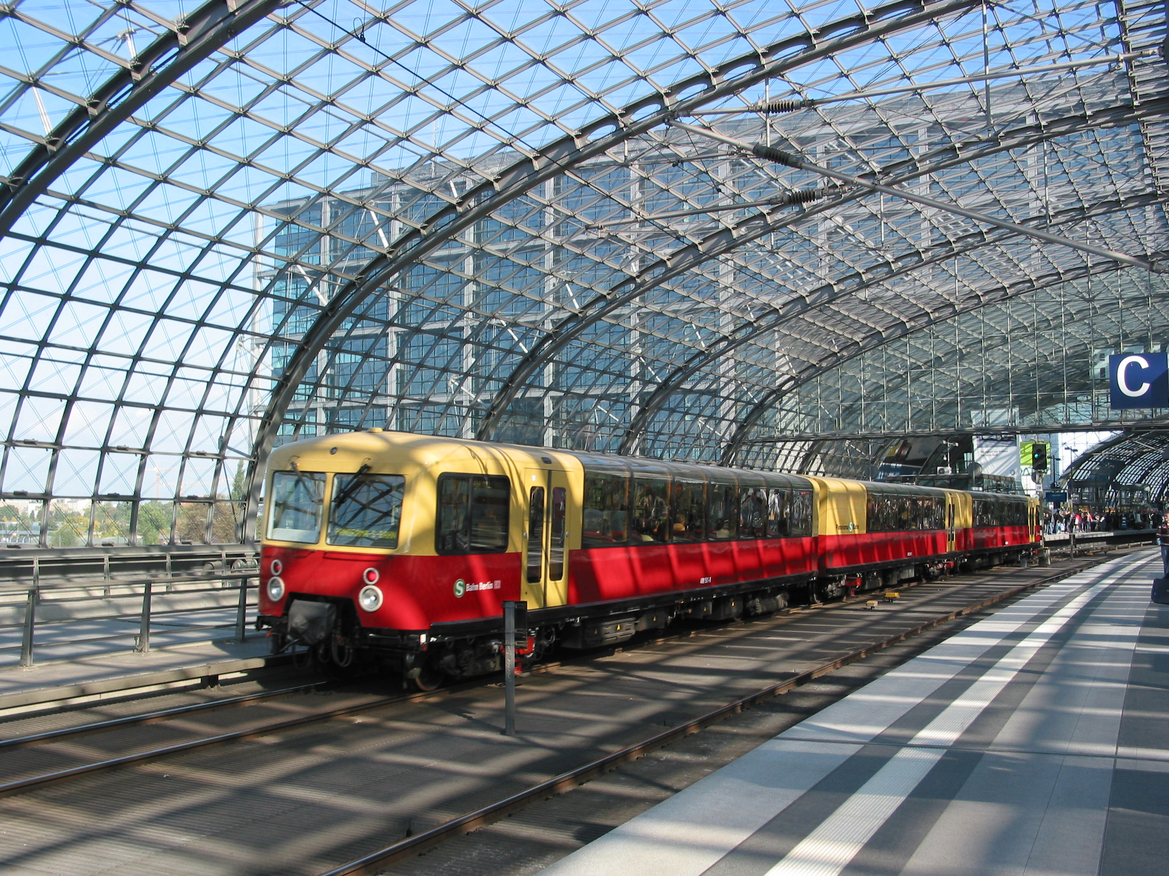 Panorama S-Bahn 488 001 in Berlin Hauptbahnhof